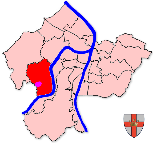 Karte mit Bisholder im Stadtteil Koblenz-Güls